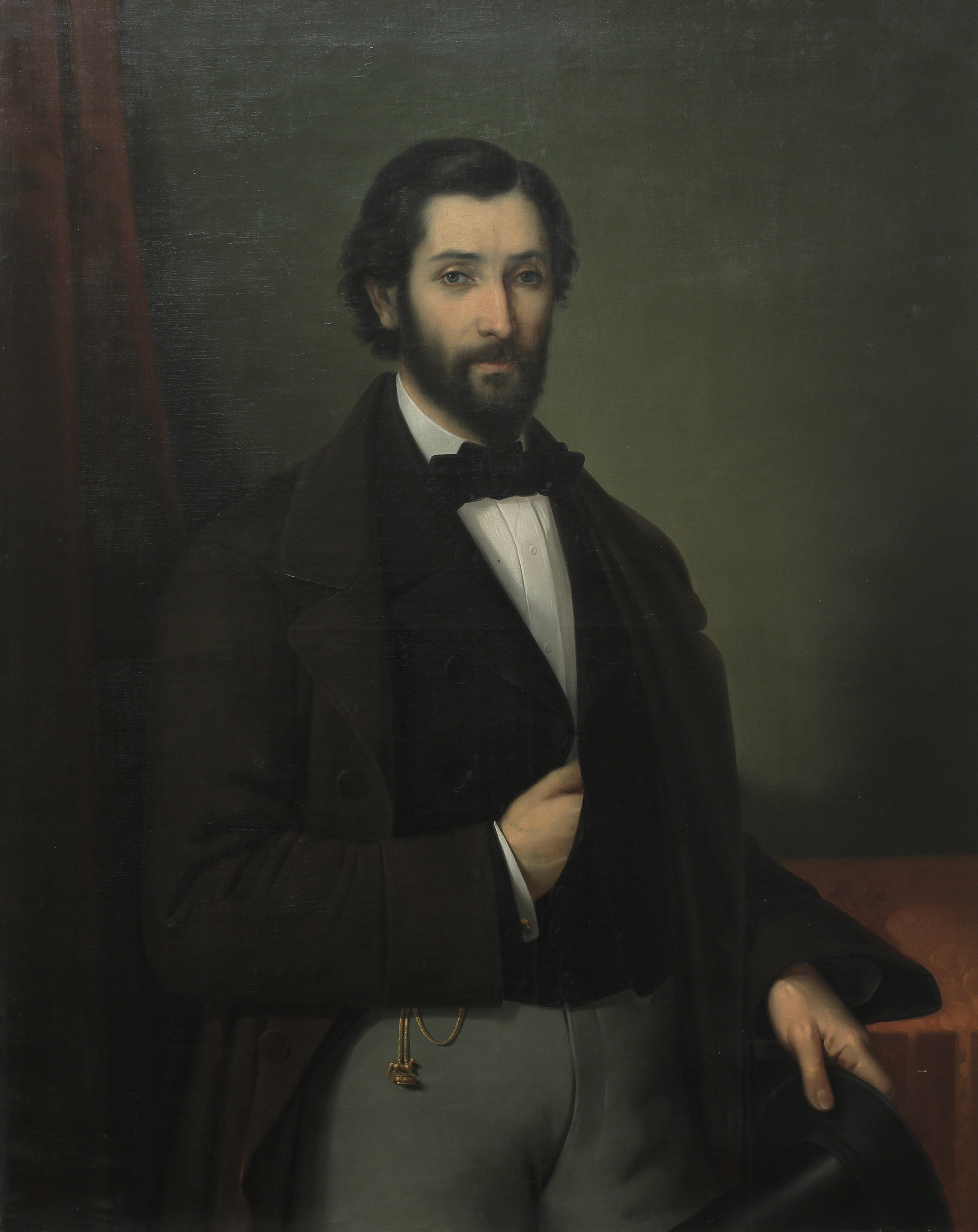 Portretul colonelului Alexandru Chirilov (Kirilov) denumit uneori și Omul cu joben, ulei pe pânză, 107,8 x 86 cm, semnat și datat stânga jos cu brun: Tattarescu, 1855.Proveniență: Ministerul Comerțului Interior; Muzeul de Artă al R.S.R.; Transferat în anul 1952 Muzeului de Artă Cluj.Bibliografie: Angelescu, N.I., Negustorii de odinioară (Nicolae Kirilov și Alexandru Kirilov), București, 1930; Angelescu, N.I., Catalogul Galeriei de tablouri a Camerei de comerț și industrie, București, 1938, cat. nr. 8, repr. p. 15.; Schileru E., Das Kunstmuseum in Cluj, în die Kunst in der Rumänischen Volksrepublik, 11, Bukarest, 1956, p. 8, repr. p.7; Wertheimer-Ghika, Jacques, Gheorghe M. Tattarescu un pictor român și veacul său, București, 1958, pp. 113, 115, repr. p. 81; Wertheimer-Ghika, Jacques, Gheorghe Tattarescu și Revoluția de la 1848, București, 1971, p. 38, repr. p. 22; Lăptoiu, Negoiță, Muzeul de Artă din Cluj (ghid), București, 1974, p. 14; Muzeul de Artă Cluj-Napoca, Catalog patrimonial, vol.I, Cluj-Napoca, f.e., 1976, p. 86, nr. cat. 187, repr. p. 86; Portretul bancherului Alexandru Kirilov, în Gheorghe Tattarescu (1818-1894), București, Alcor Edimpex, aprilie 1995, p. 9.